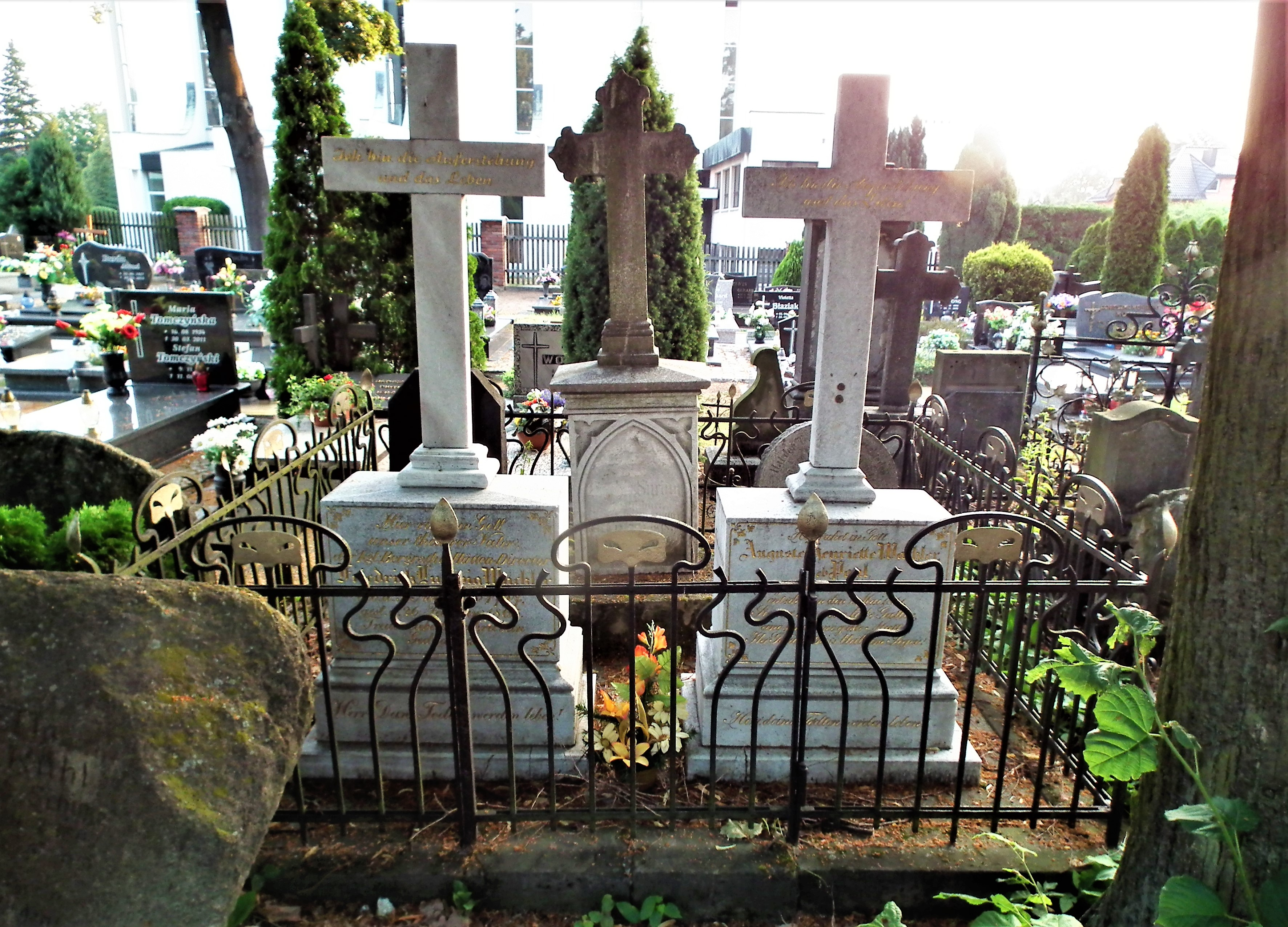 Groby małżeństwa Wachlerów w Ozimku. Friedrich Ludwig Wachler.